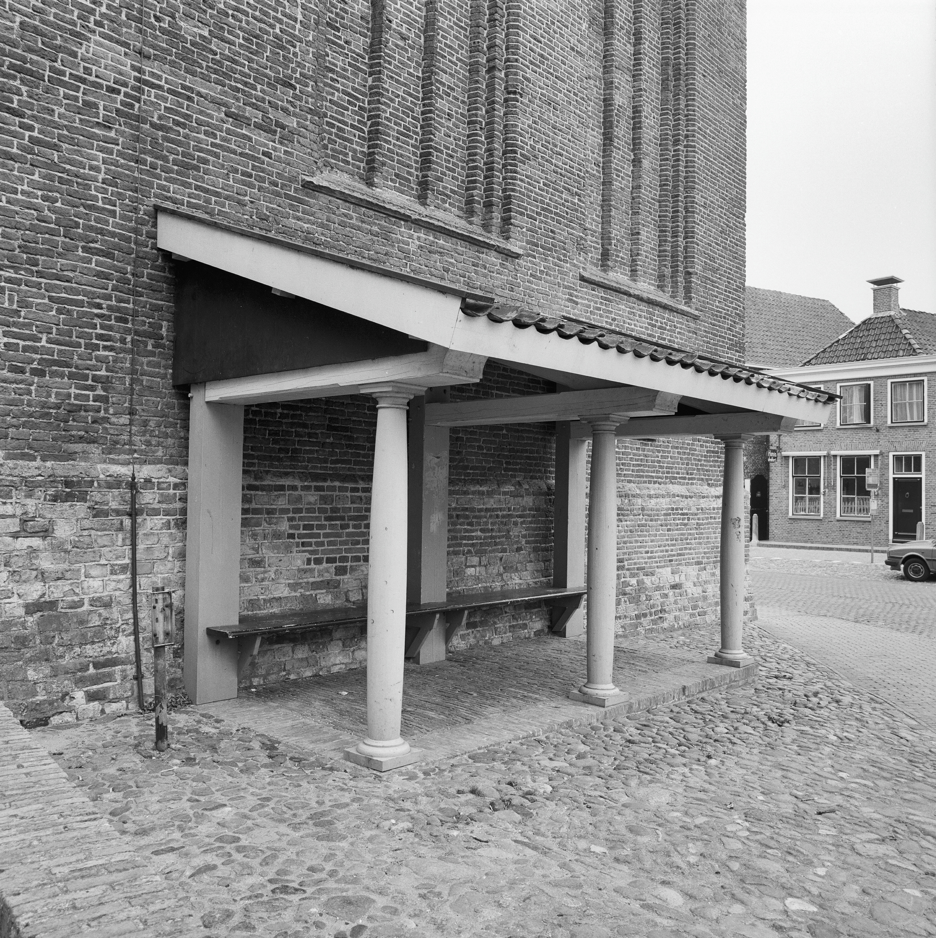 Nederlands Hervormde Kerk: Exterieur LEUGENBANK TEGEN TOREN